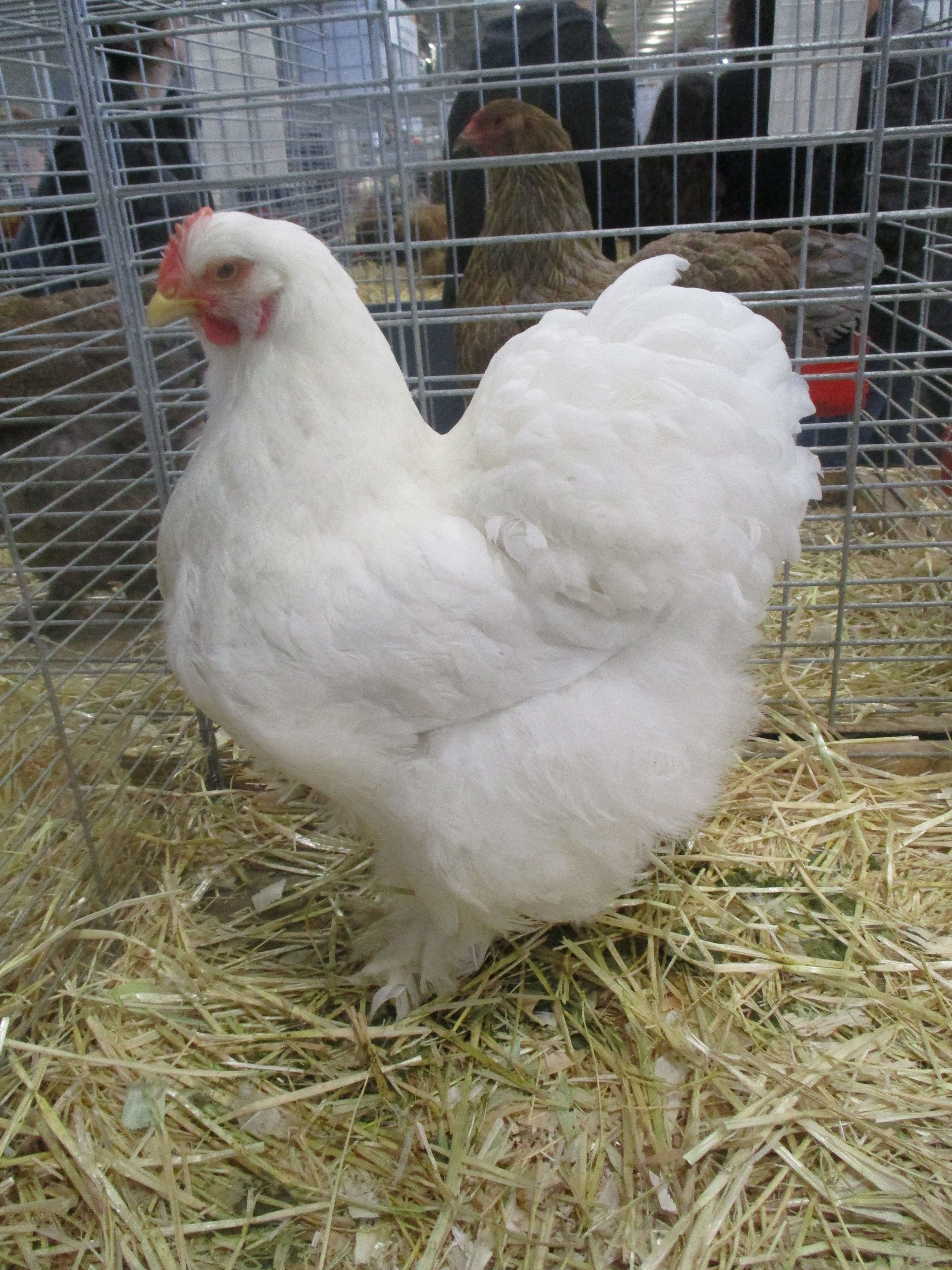 Poule cochin blanche au SIA 2020.